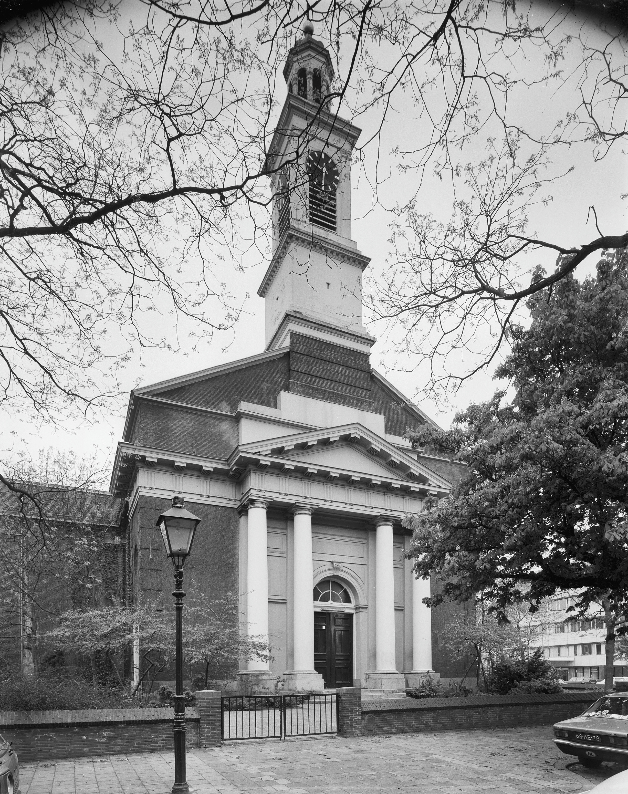 NEDERLANDS HERVORMDE KERK (HOFLAANKERK): Exterieur WESTGEVEL